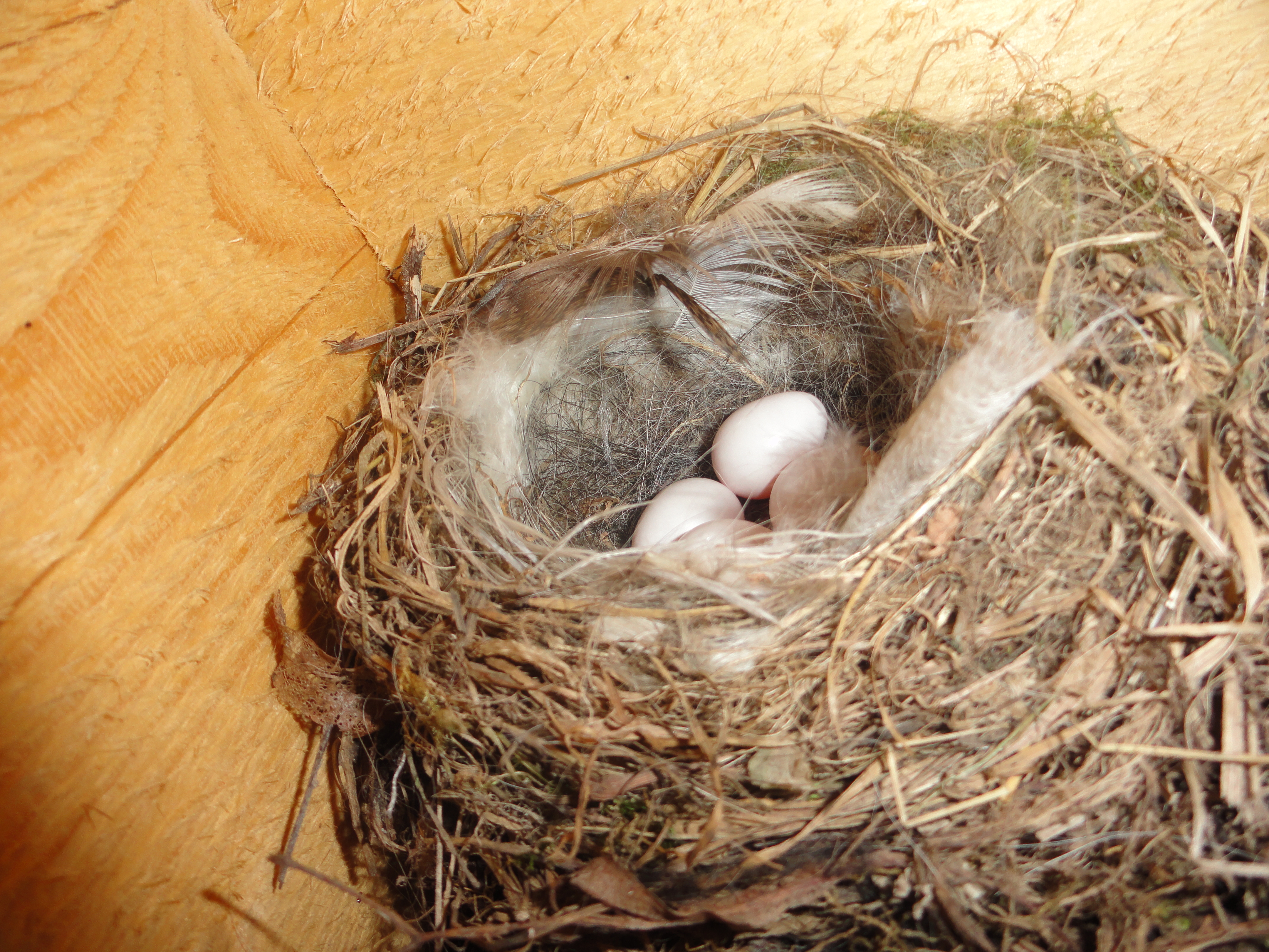 Гнездо с кладкой яиц